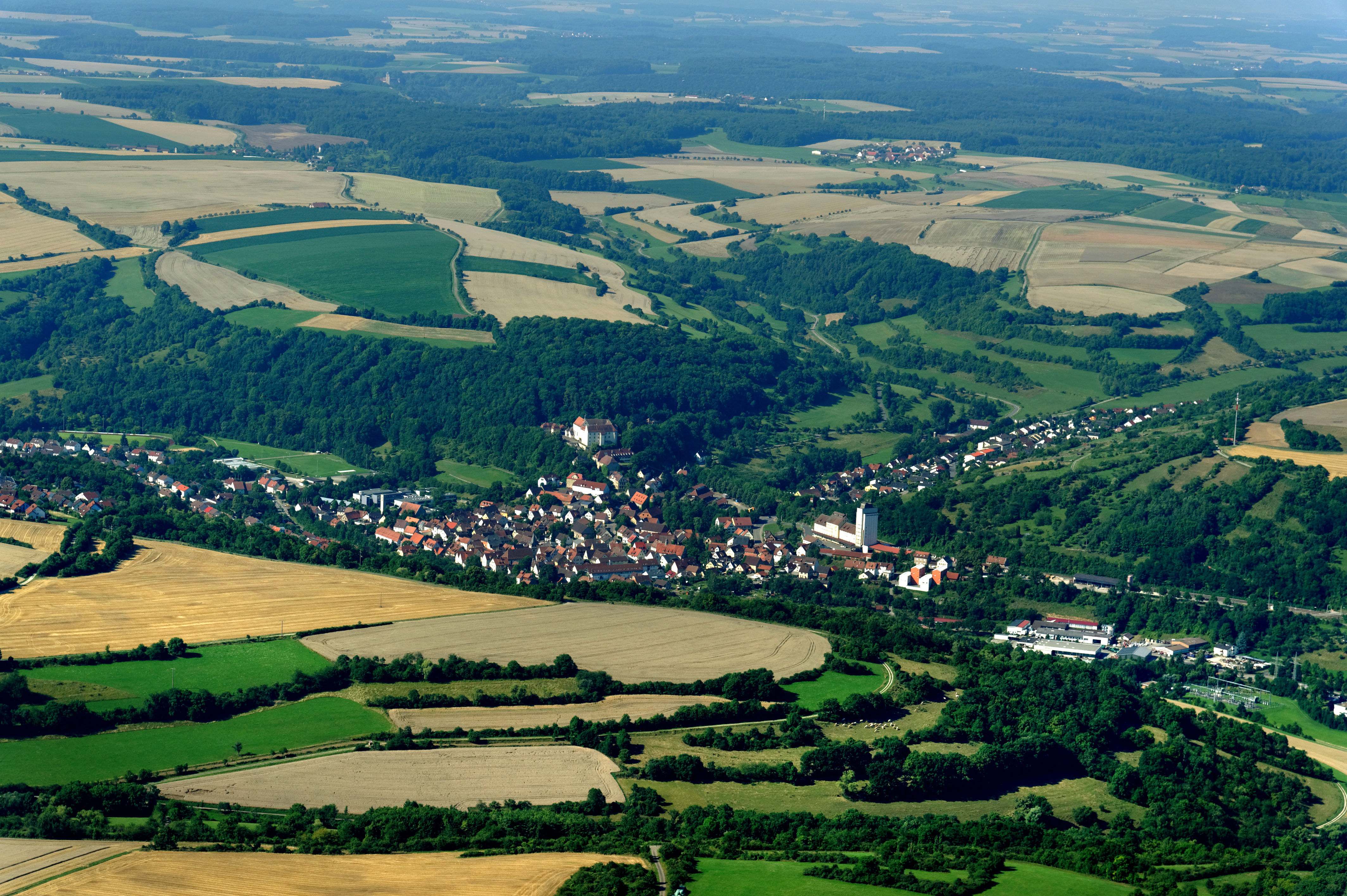 Niederstetten aus dem Flugzeug gesehen.